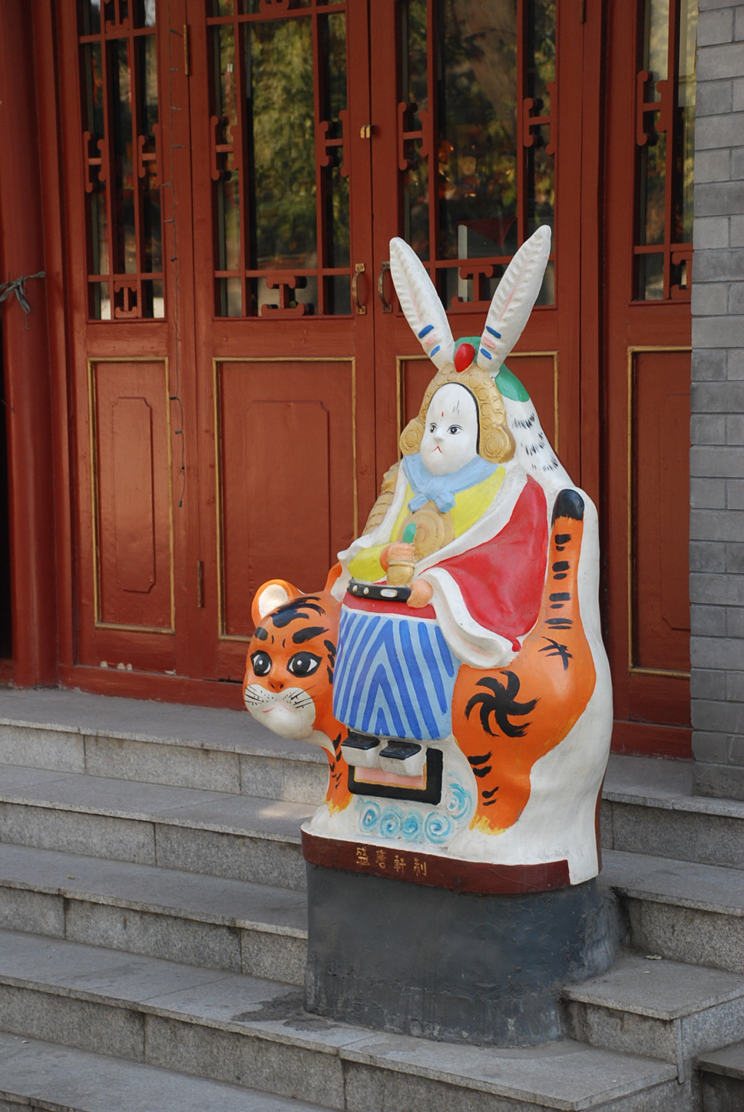 国子监街上的兔儿爷